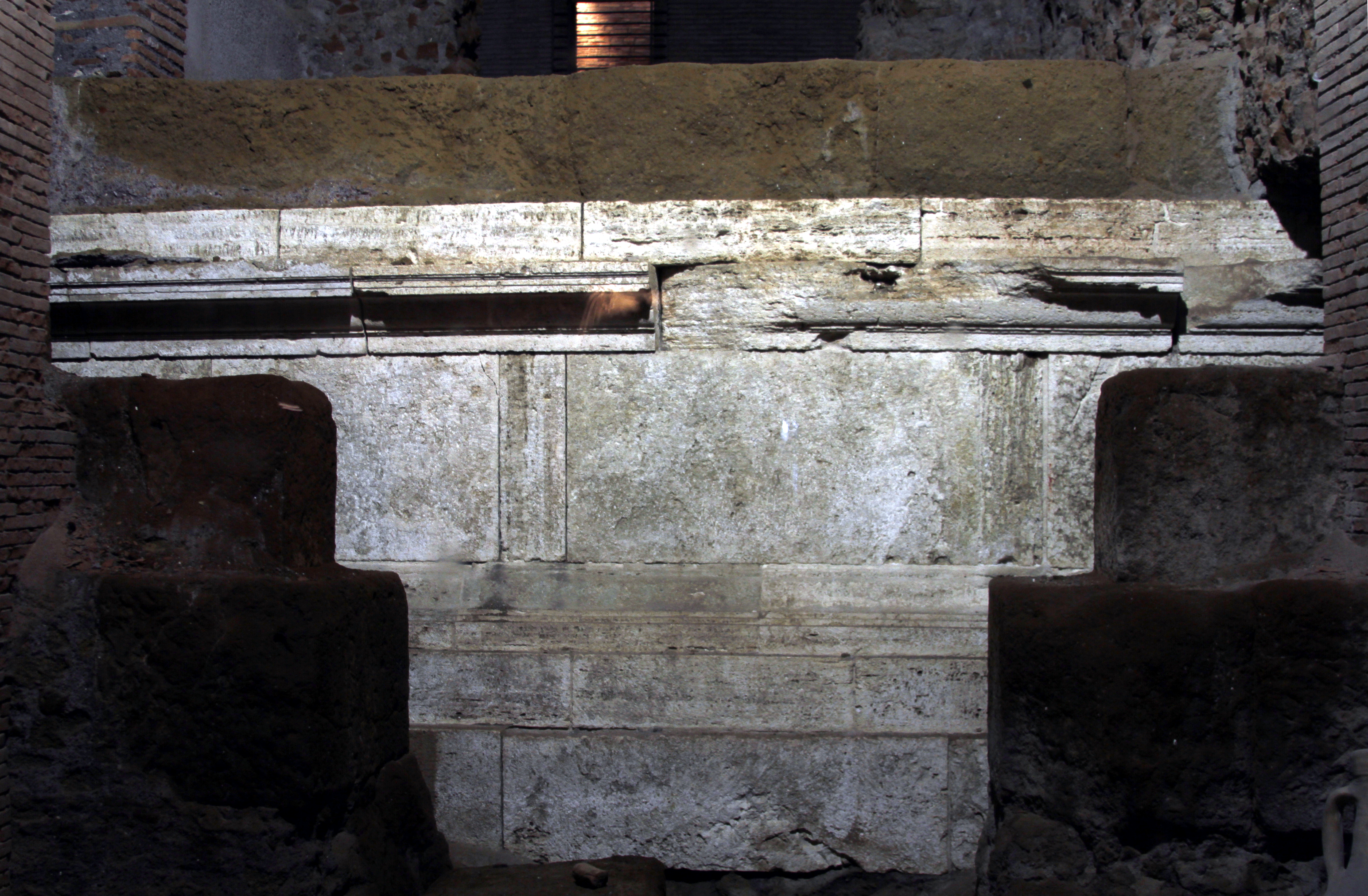 Tabularium - Rome